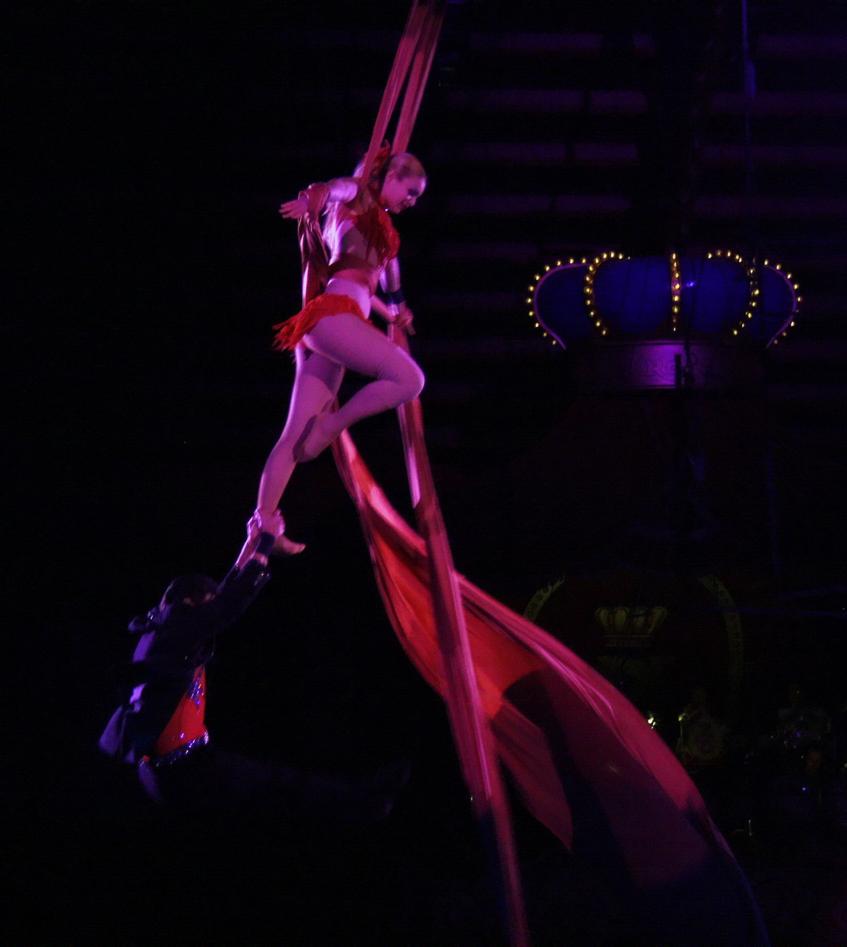 AMBRA & IVES Artistenpaar aus Spanien und Italien. Luftballett zum Tangorhythmus.